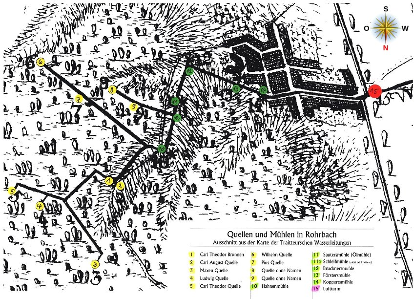 Die Quellfassungen in HD-Rohrbach für die Wasserleitung nach Mannheim